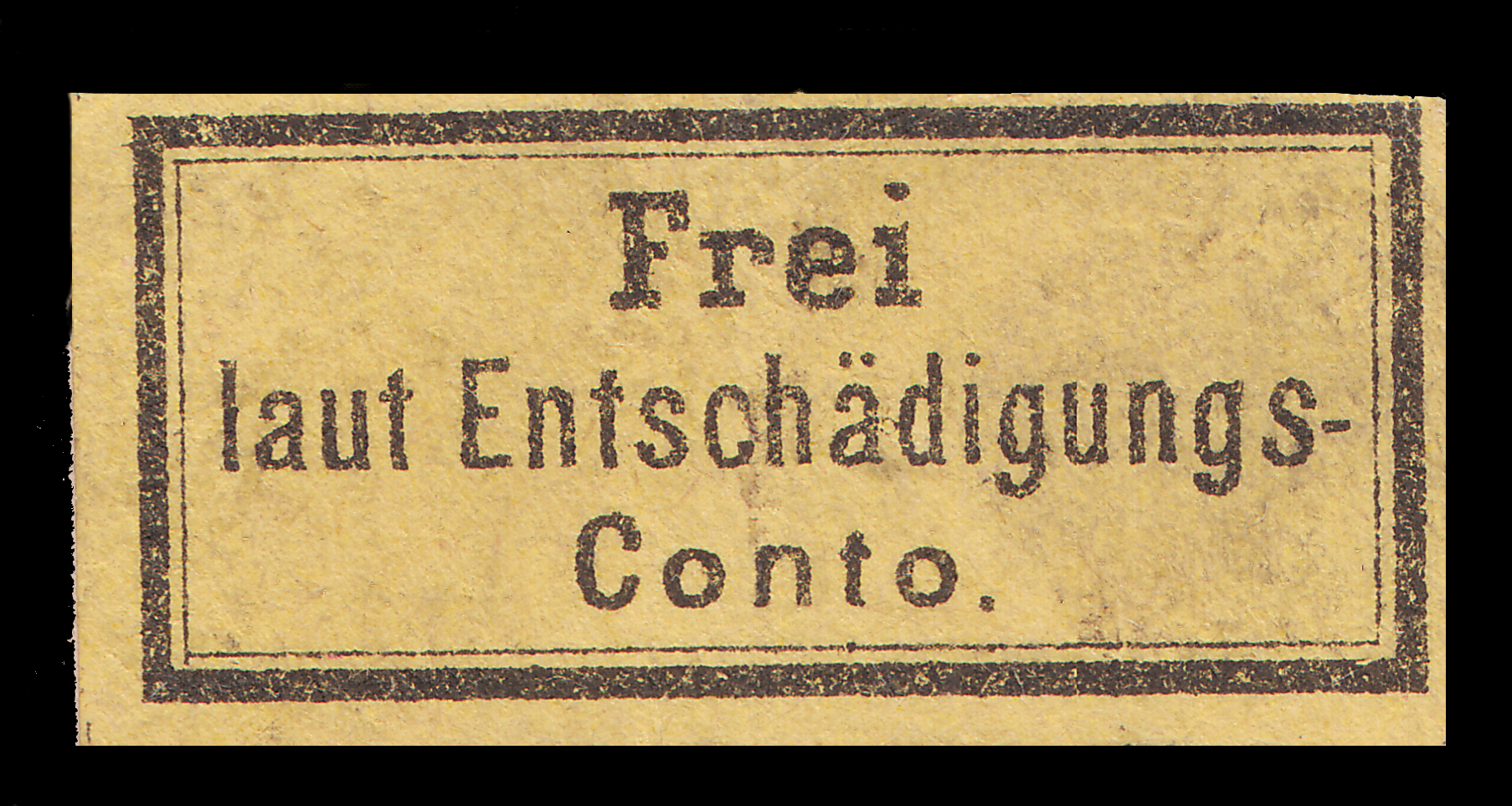 Dienstmarkenvorläufer I 1870 Deutsches Reich Michelnummer I